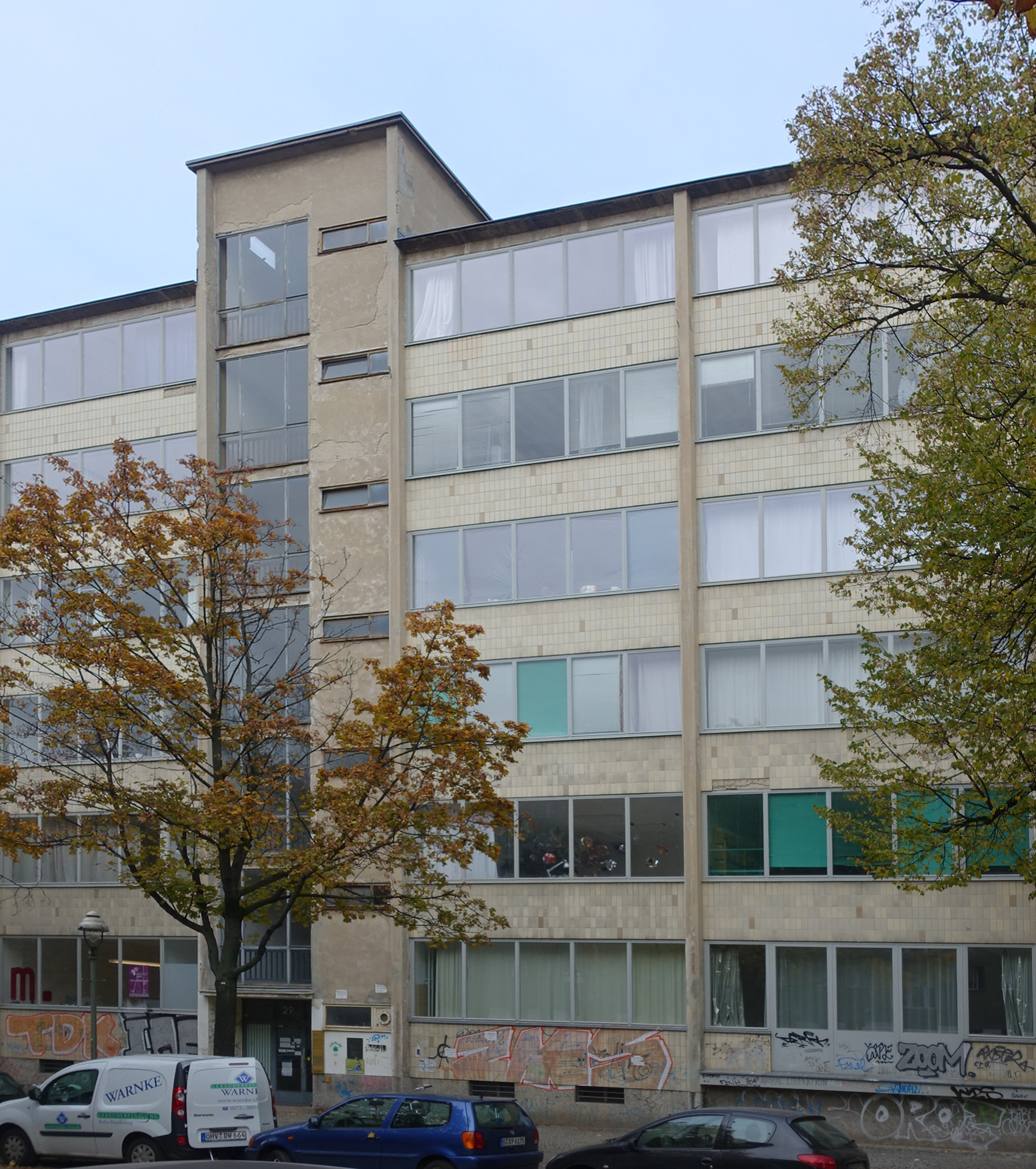 Verwaltungsbau